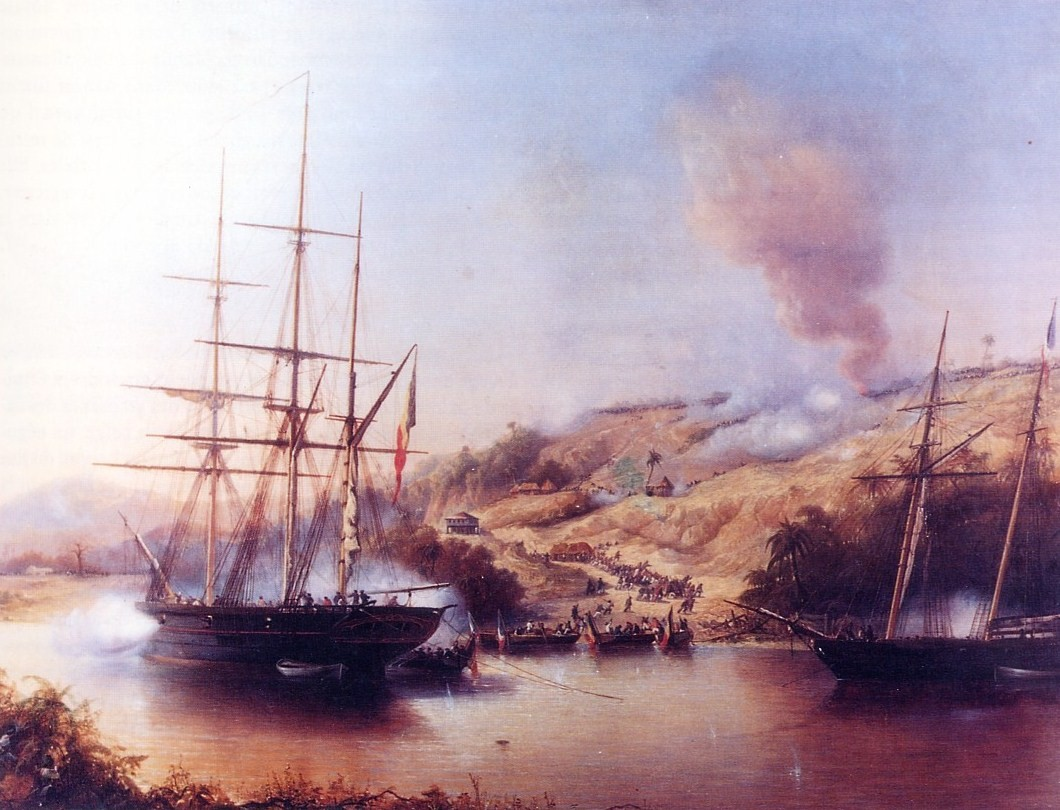 La prise et la destruction de Debokké,1849. Huile sur toile.